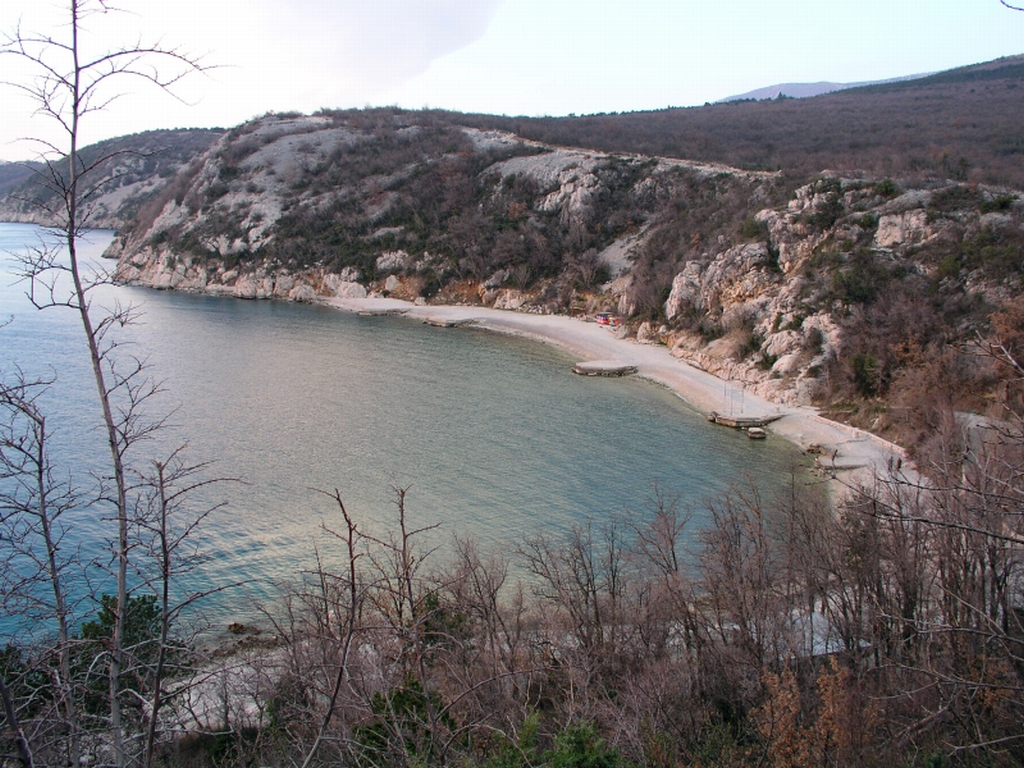 plaža Kačjak u Dramlju, Hrvatska